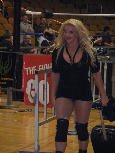 Melissa Coates under her "Mile High Melissa" gimmick